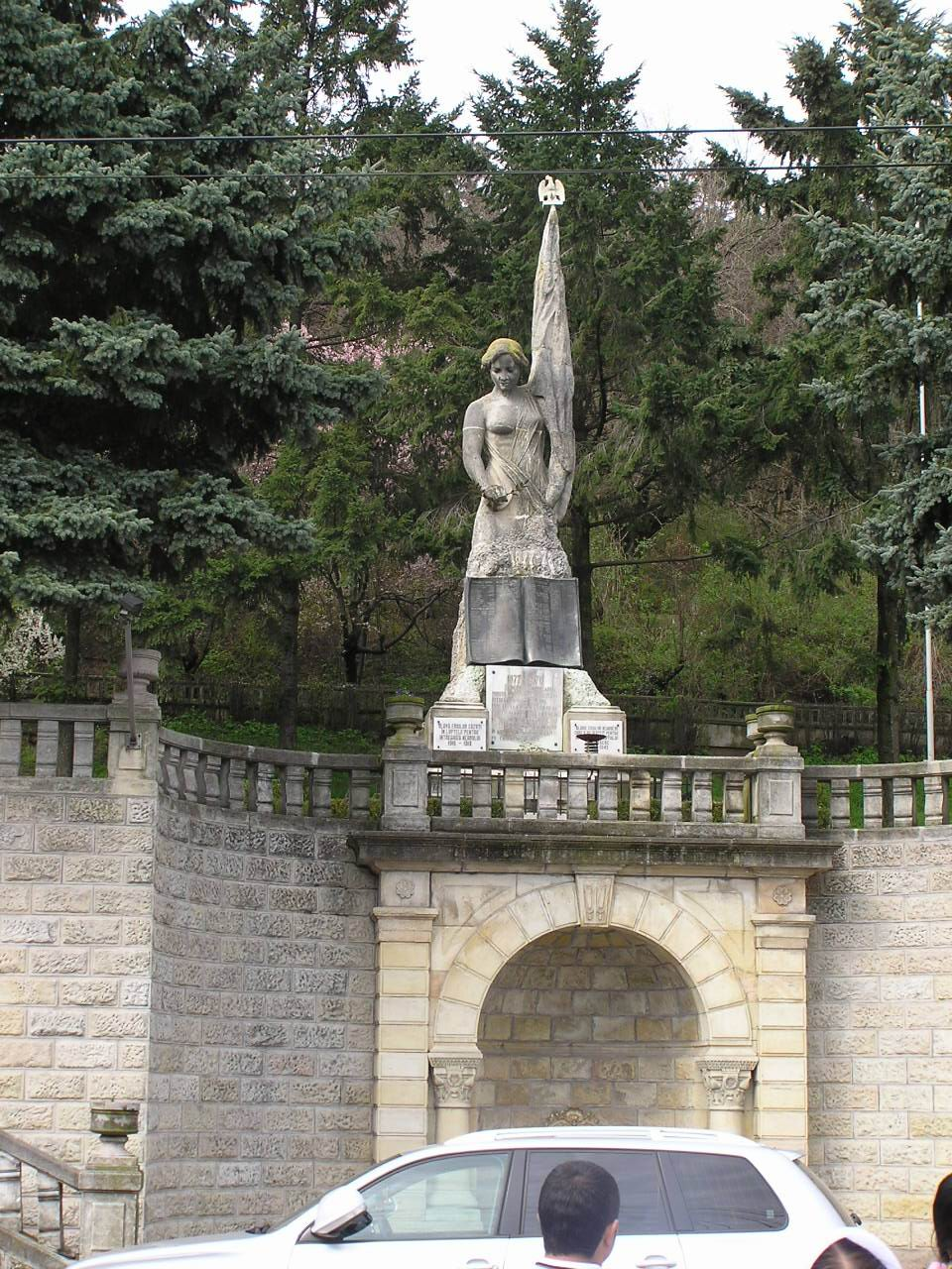 Denkmal in Râmnicu Vâlcea, Rumänien, für die Unabhängigkeit vom Osmanischen Reich nach dem Russisch-osmanischen Krieg.